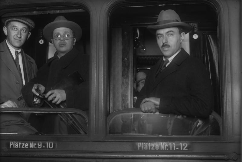 Die russische Wirtschaftsdelegation für Genf unter Führung der früheren russischen Volkskommissare Ossinski und Sokolnikow in Berlin ! Der 2. Führer der russischen Wirtschaftsdeligation Volkskommissar Sokolnikow (rechts am Fenster) und links der Generalsekretär und Pressechef der Delegation Boris Stein.